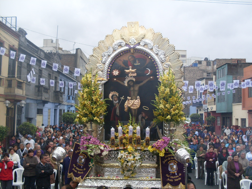 El Señor de los Milagros de Jesús María en la Av. Garzon, saliendo de su local Institucional.